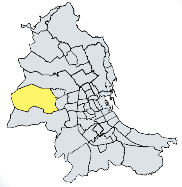 Borgo Nuovo